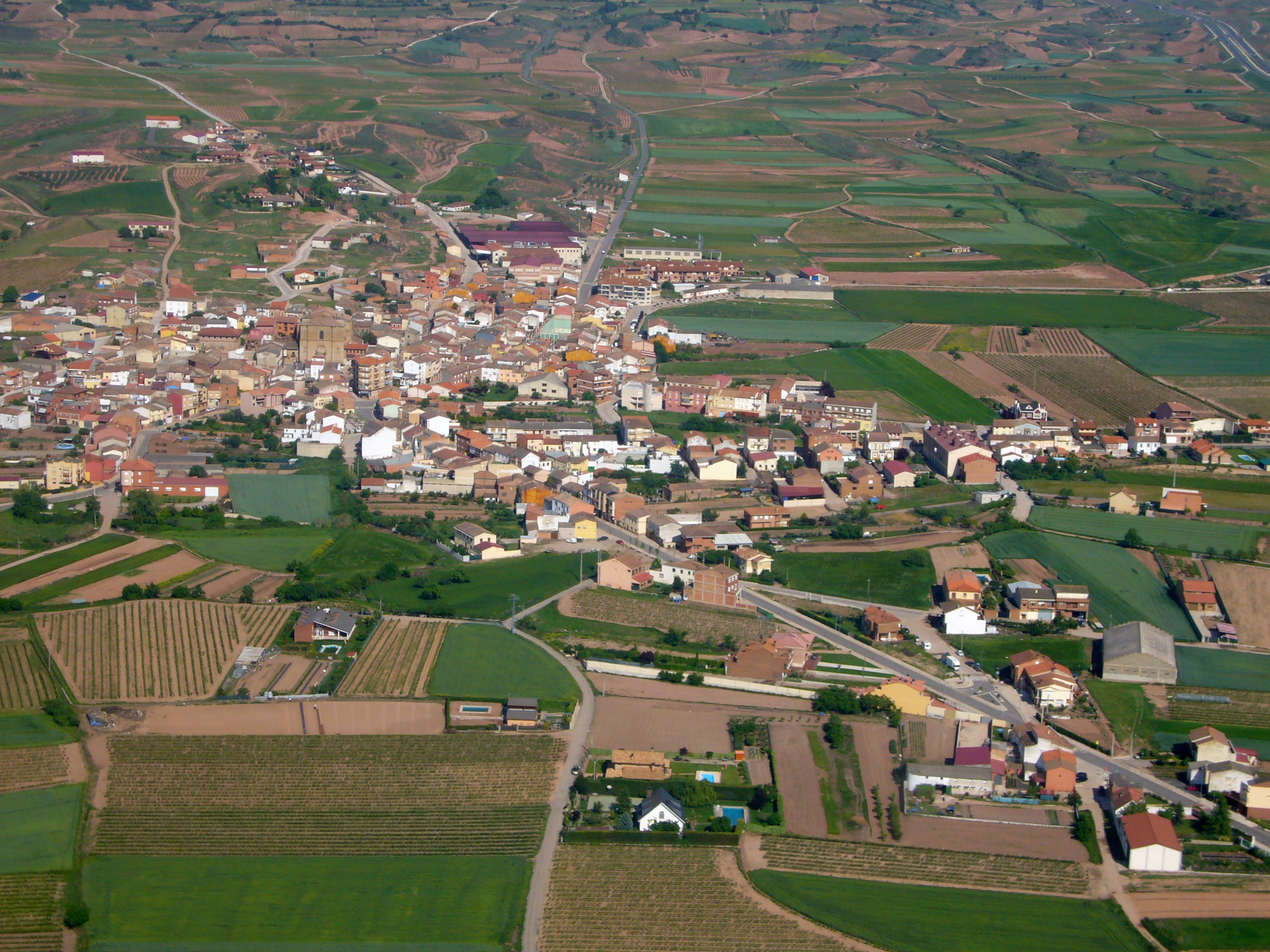 Panorámica de Huércanos 26314